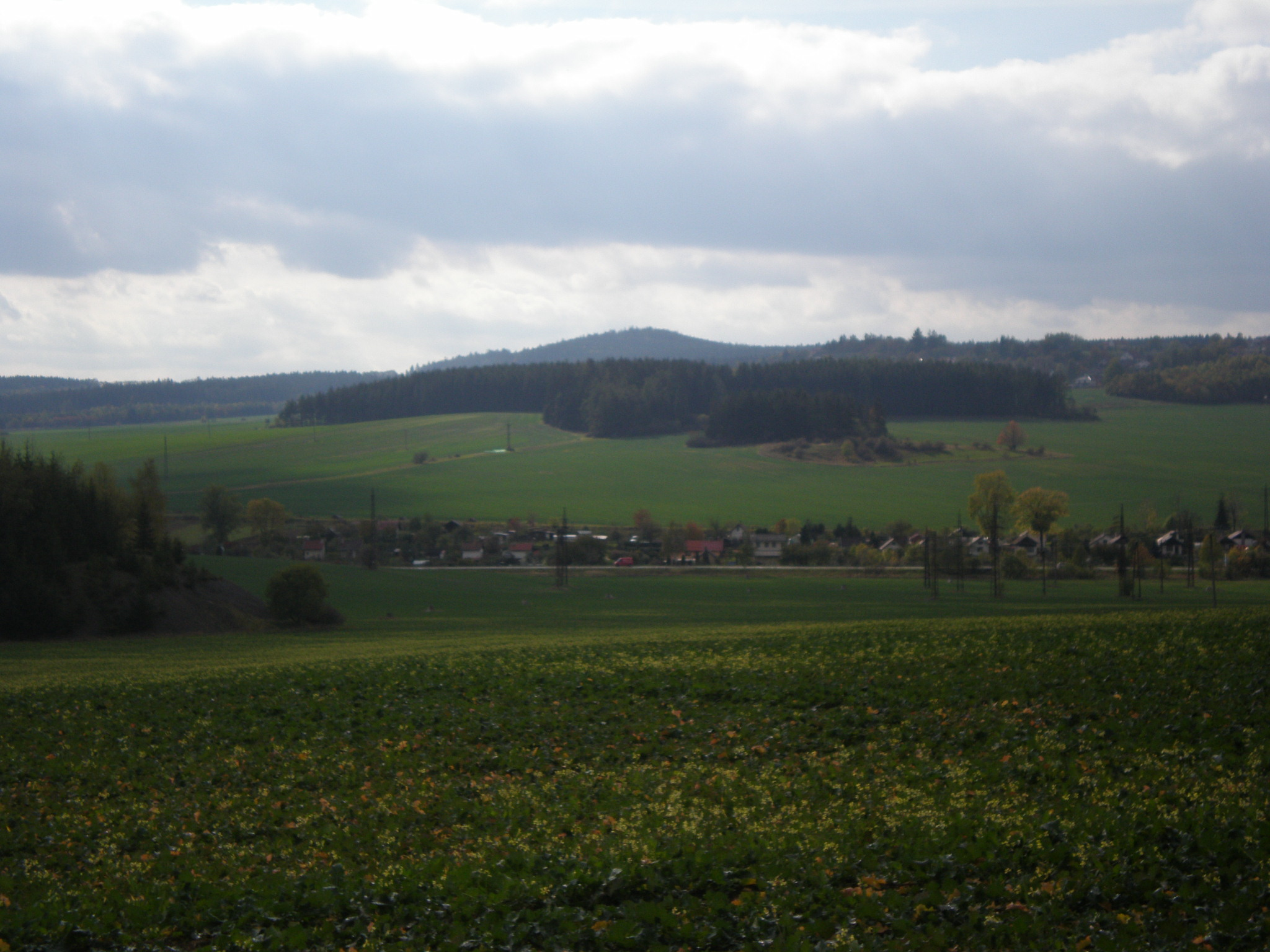 Nejvyšší vrch Příbramské pahorkatiny, Vojna (667 m). (Neznámé stanoviště fotoaparátu a neidentifikovaná vesnice v popředí - snad Narysov?)